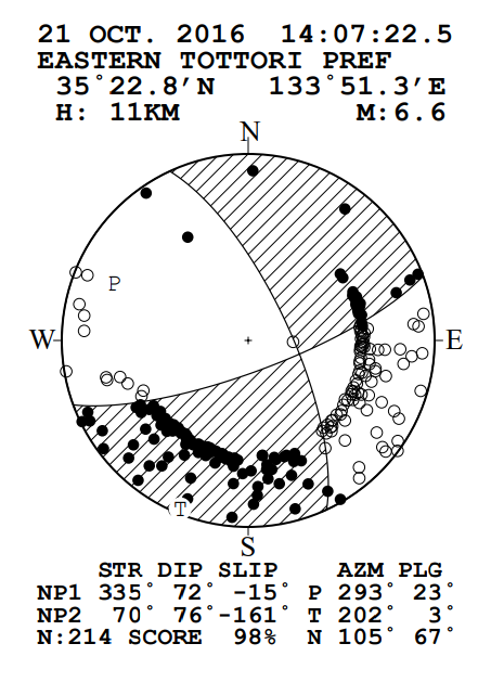 2016年10月21日14时07分 鸟取县 M6.6 CMT